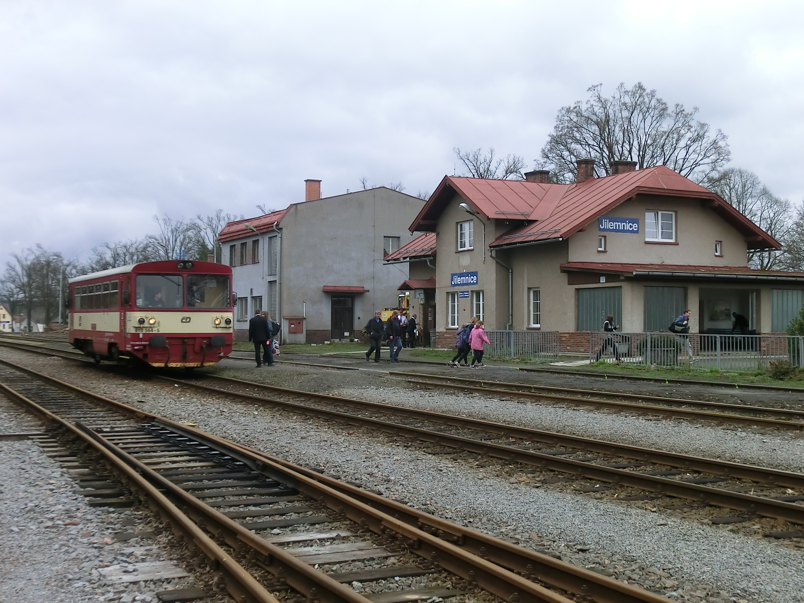 Motorový vůz 810.564 na MOs 15512 v Jilemnici.